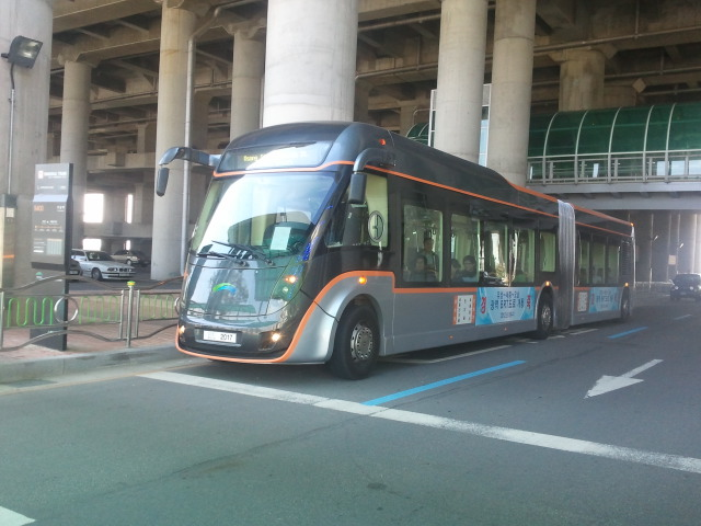 오송역~세종특별자치시~반석역간 바이모달 트램